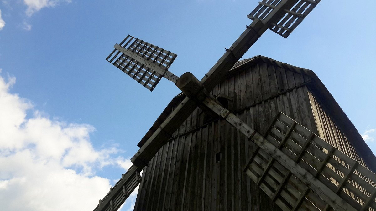 Строчыца. БДМНАБ. Ветраны млын з в. Даматканавічы